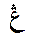 Der arabische Buchstabe Ain mit drei Punkten, zur Umschrift des Buchstabens G benutzt.